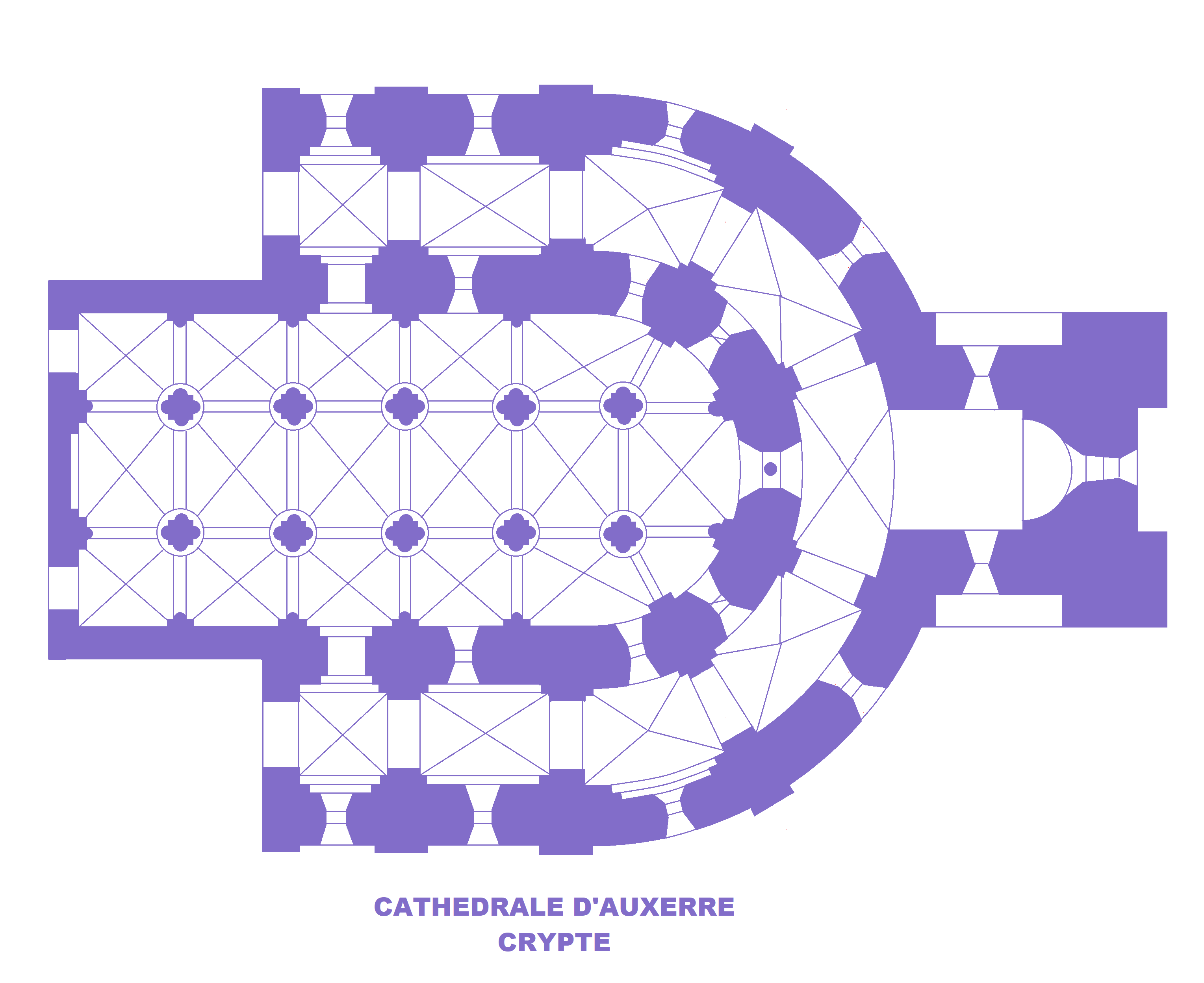 Cathédrale d'Auxerre, plan de la crypte